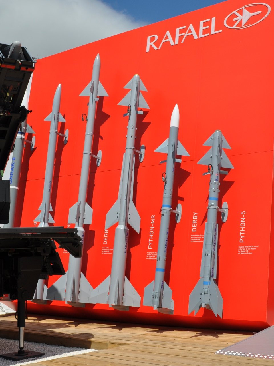 Missiles de la société Rafael Advanced Defense Systems exposés au Salon du Bourget 2011.